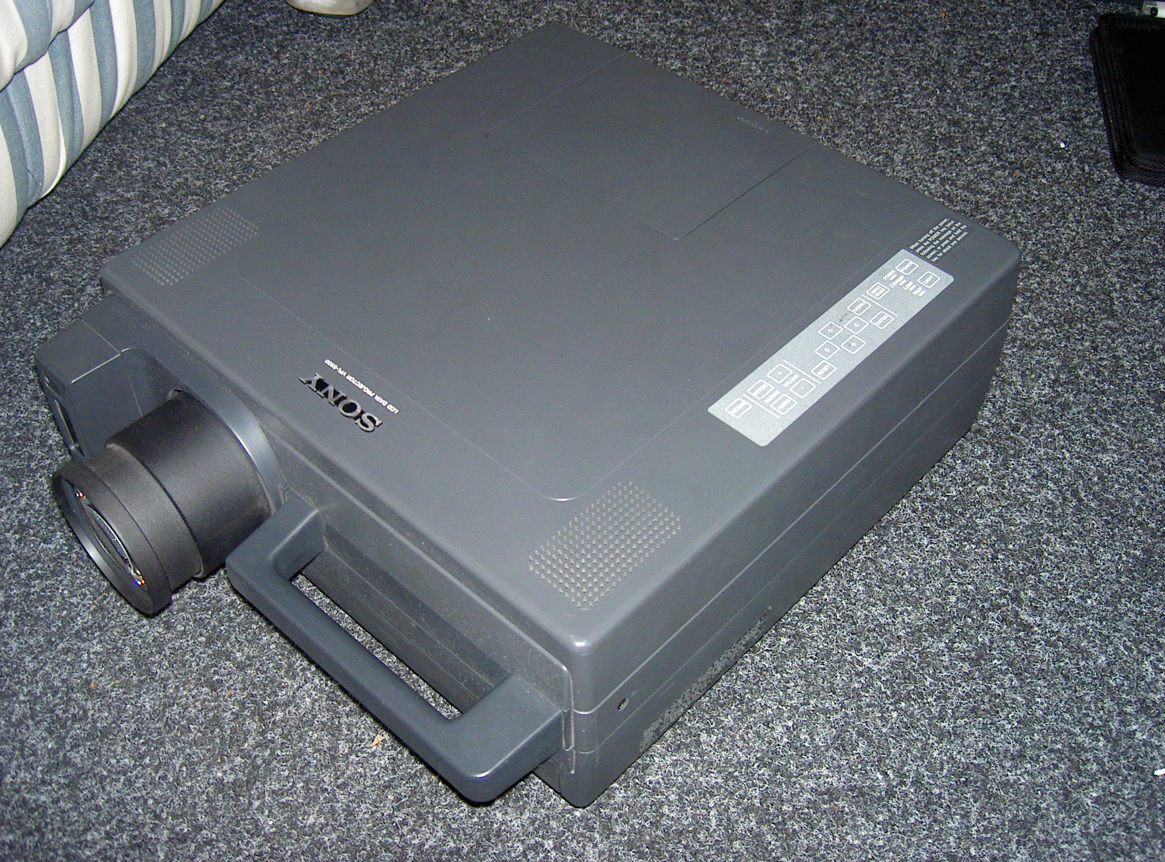 ik ben auteur van deze foto